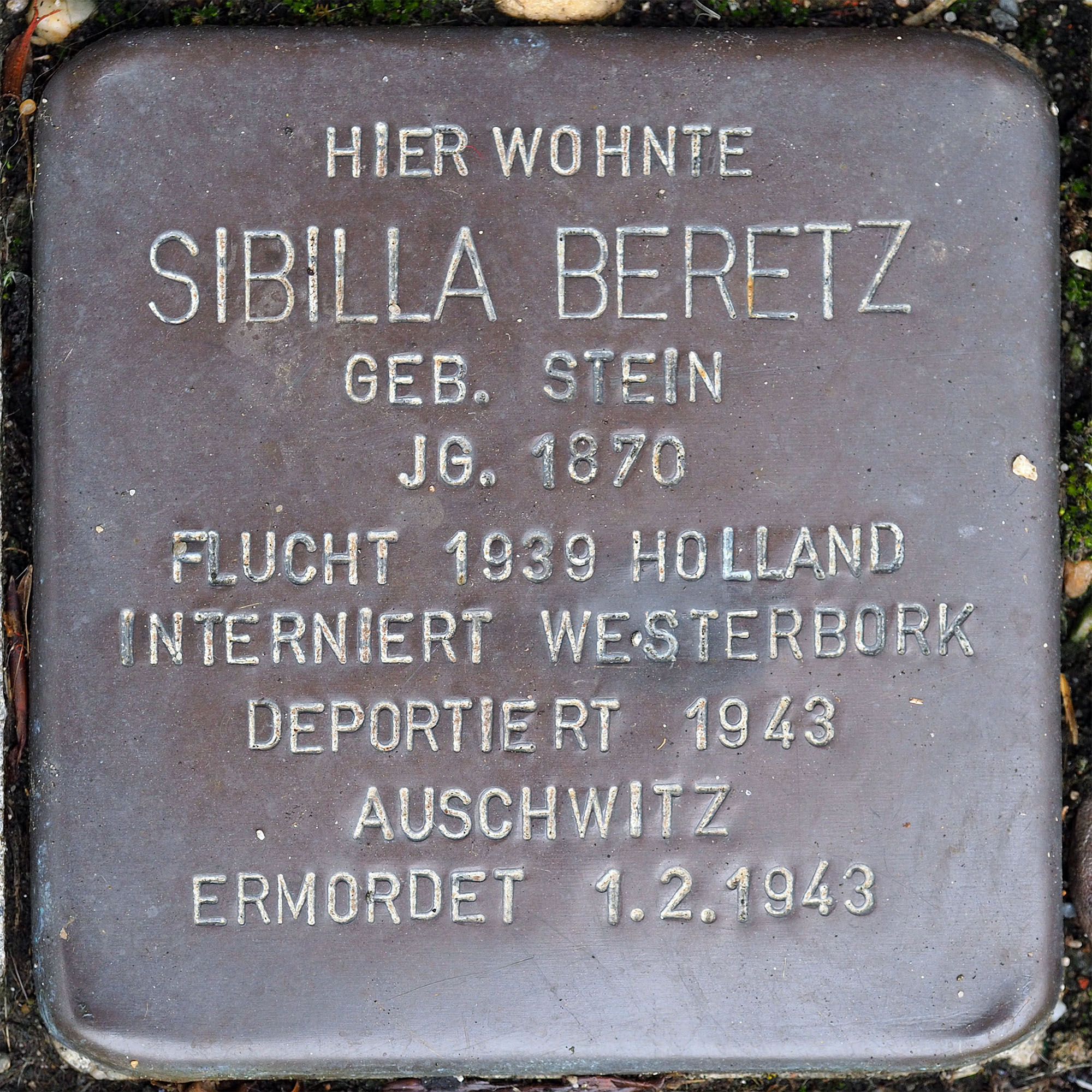 Stolpersteine GV: Beretz Sibilla